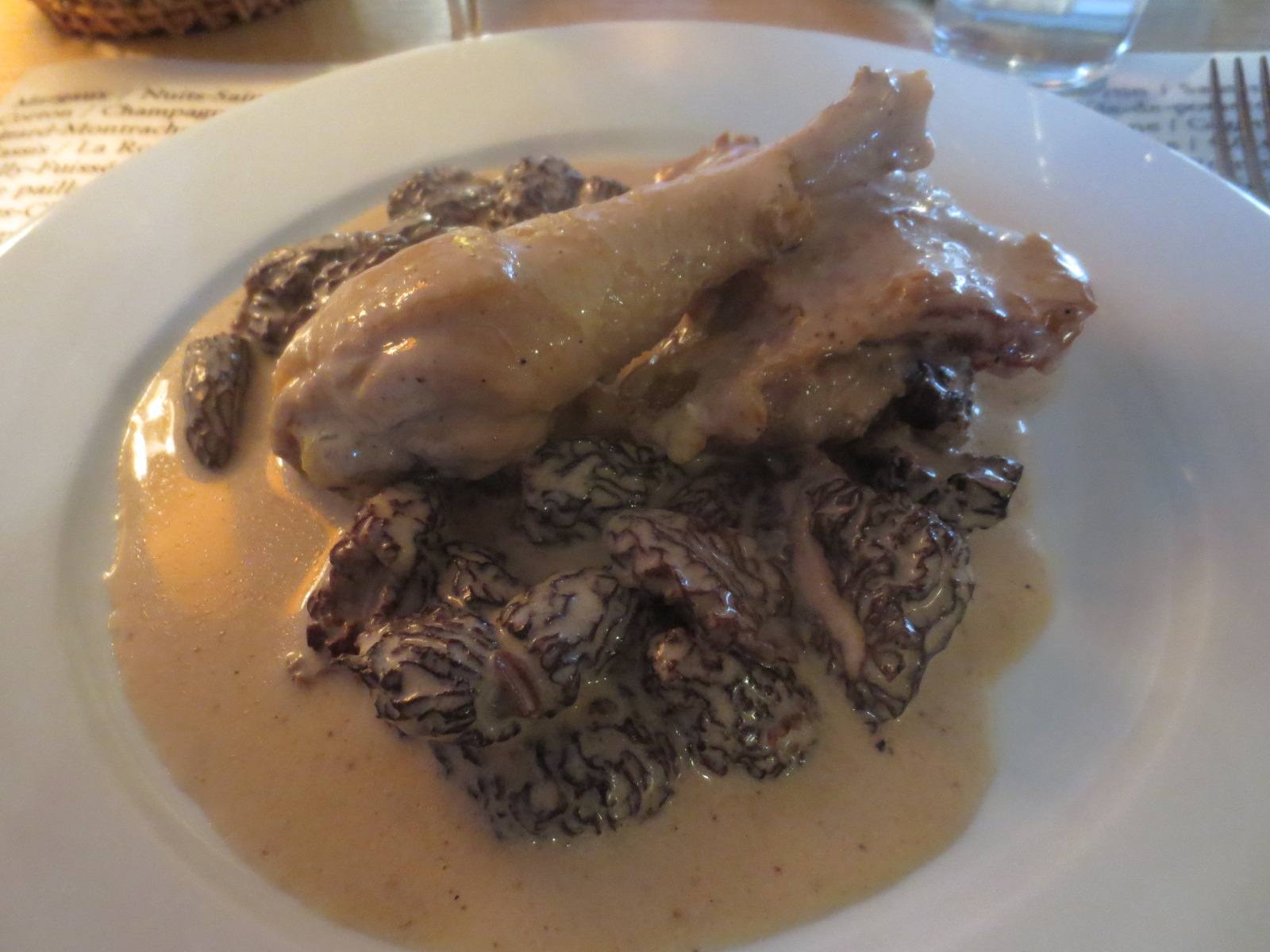 Poularde de Bresse à la crème, comté, vin jaune et morilles et verre de Savagnin